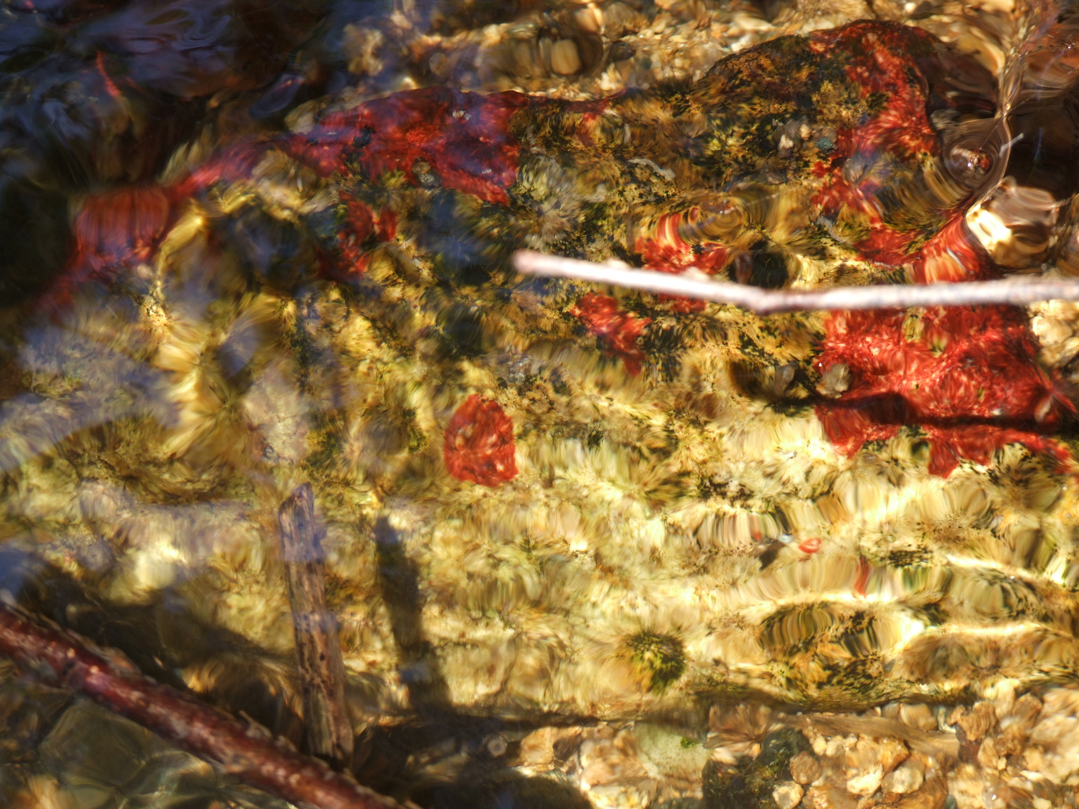 Hildenbrandia rzeczna Hildenbrandia rivularis w potoku w Masywie Ślęży (Przedgórze Sudeckie, Dolny Śląsk, Polska)